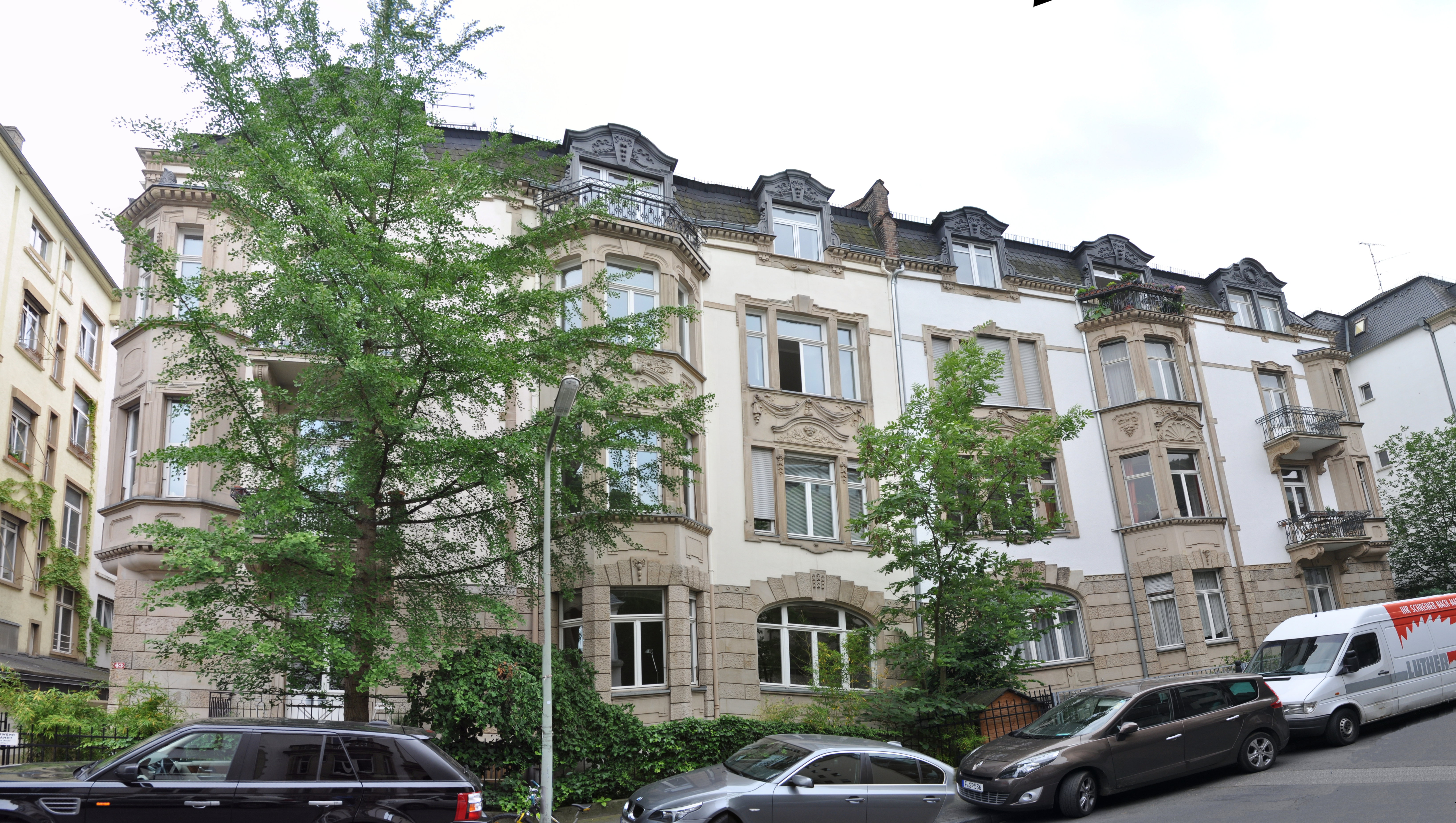 Frankfurt, Eppsteiner Straße 43-45